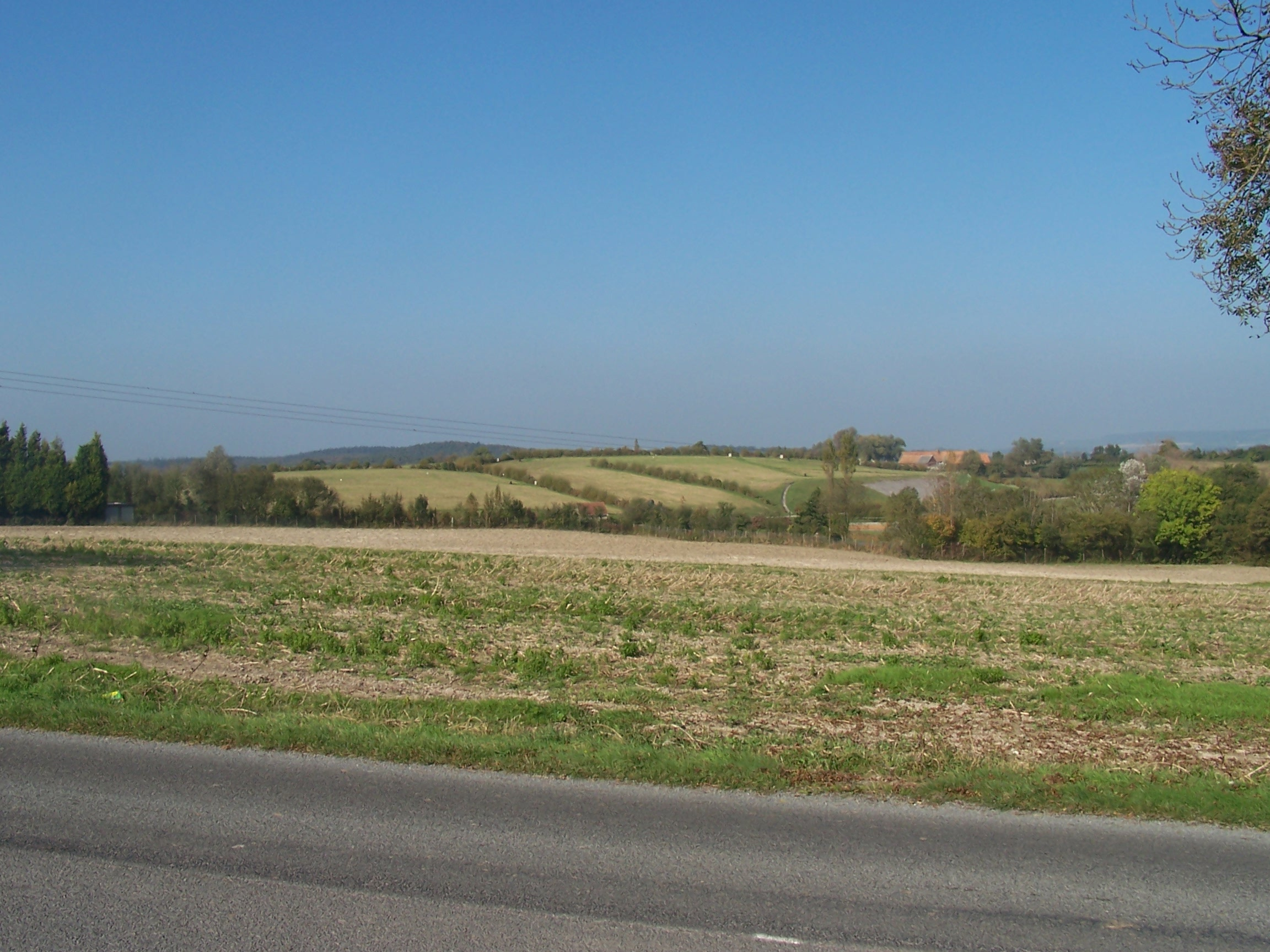 Photographie de la décharge de Menneville dans le Pas-de-Calais